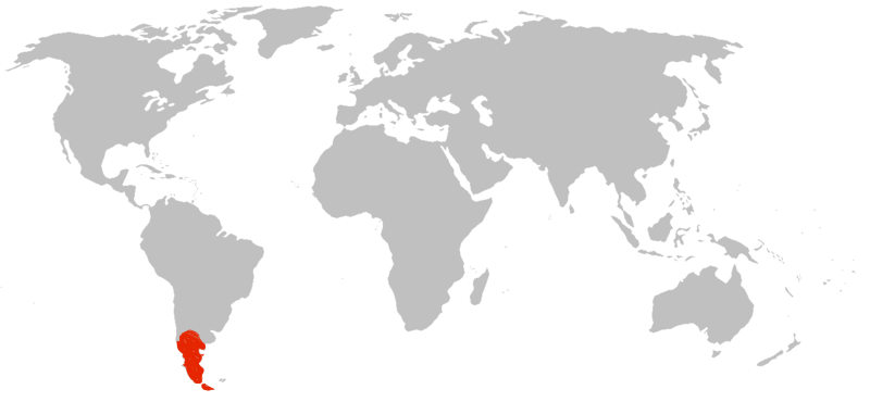 Habitat de la Mara patagónica